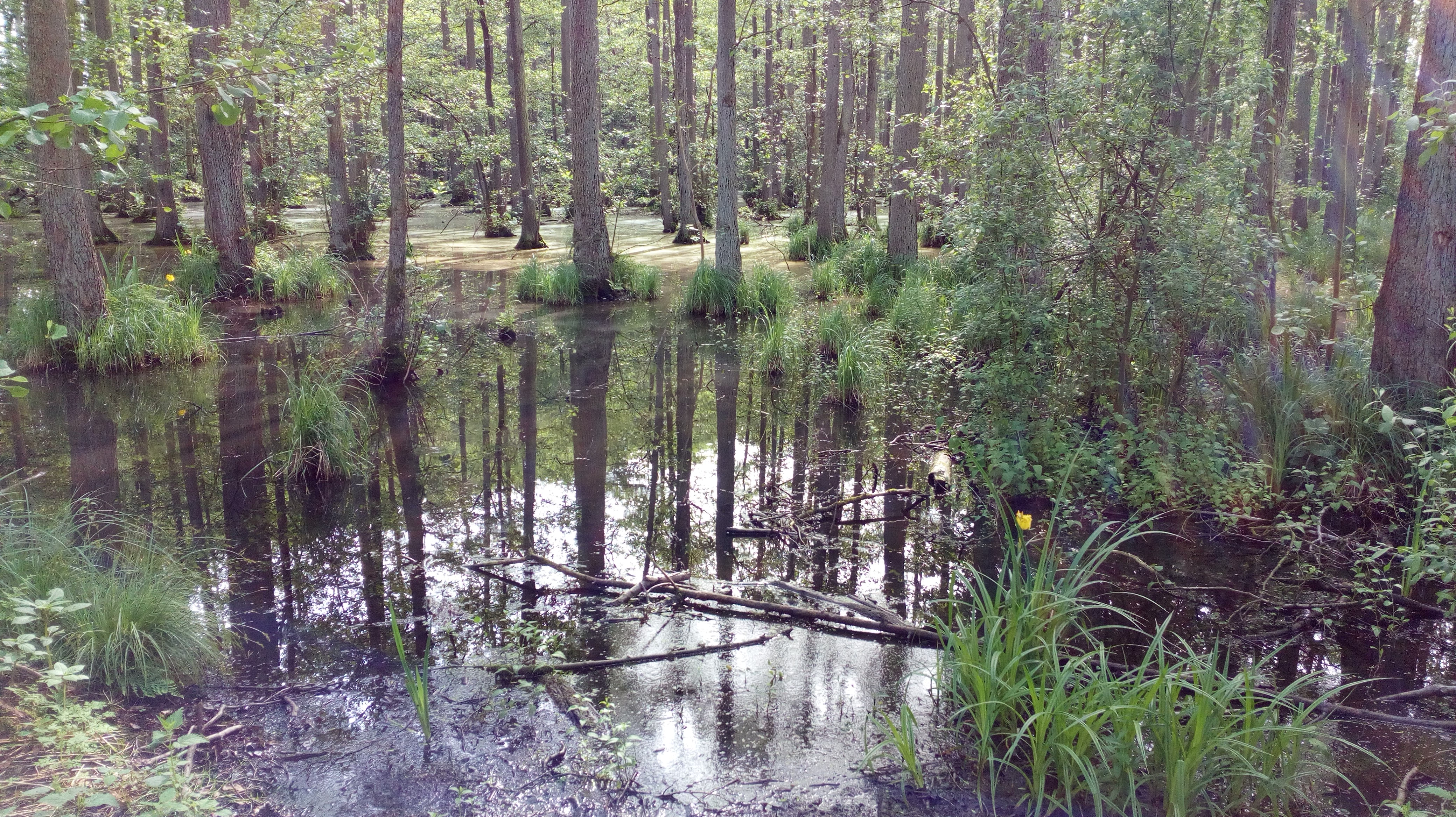 Eine abwechslungsreiche Gegend mit Wald, Wiese und Teichen. Besonders schön sind die Waldbäume im Wasser. Direkt nebenan befindet sich das Schloss Königsbrück.